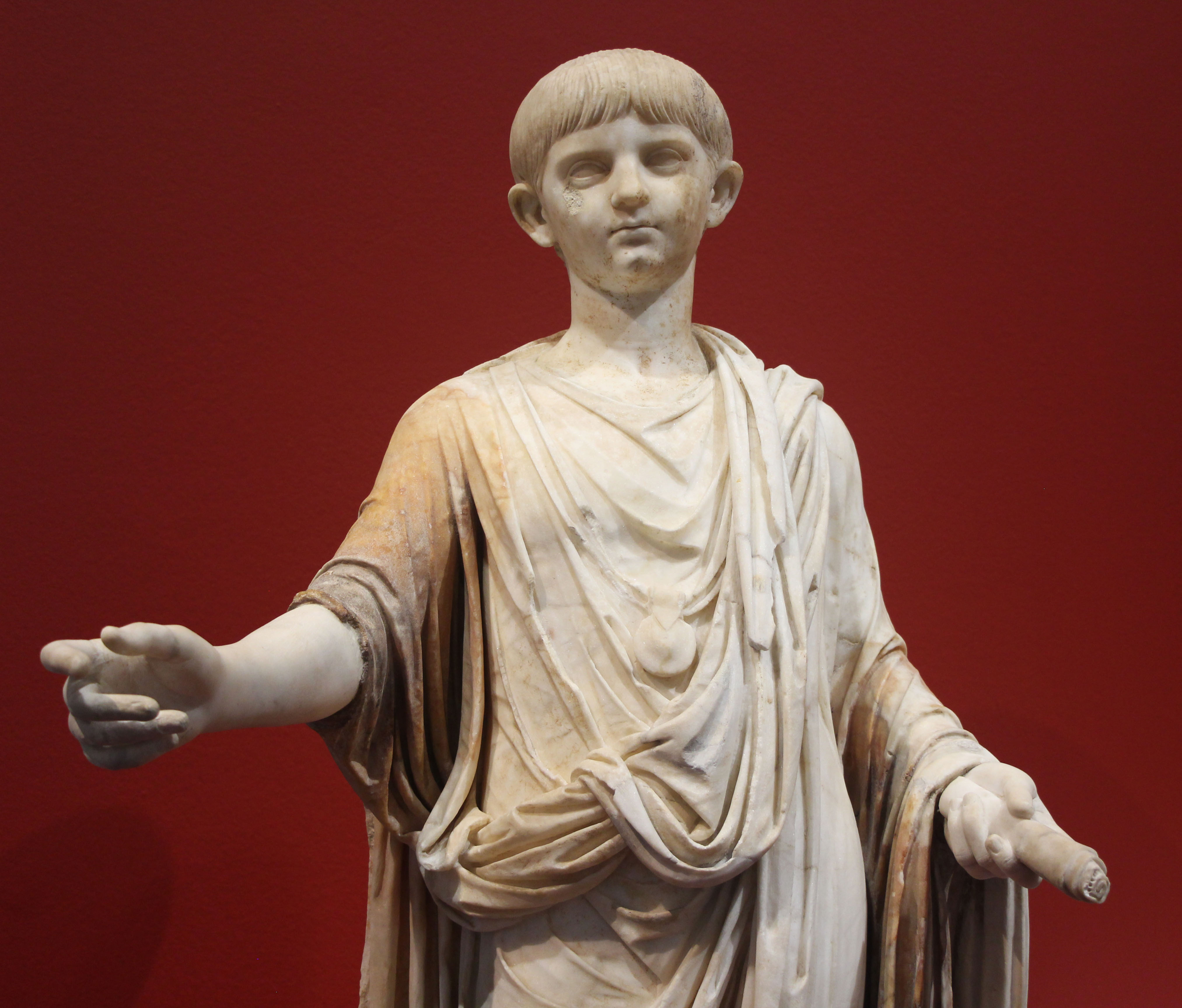 Néron enfant vers 50 ap. J.-C. Marbre Paris, Musée du Louvre, département des Antiquités grecques, étrusques et romaines, Ma 1210 - inv. MR 337